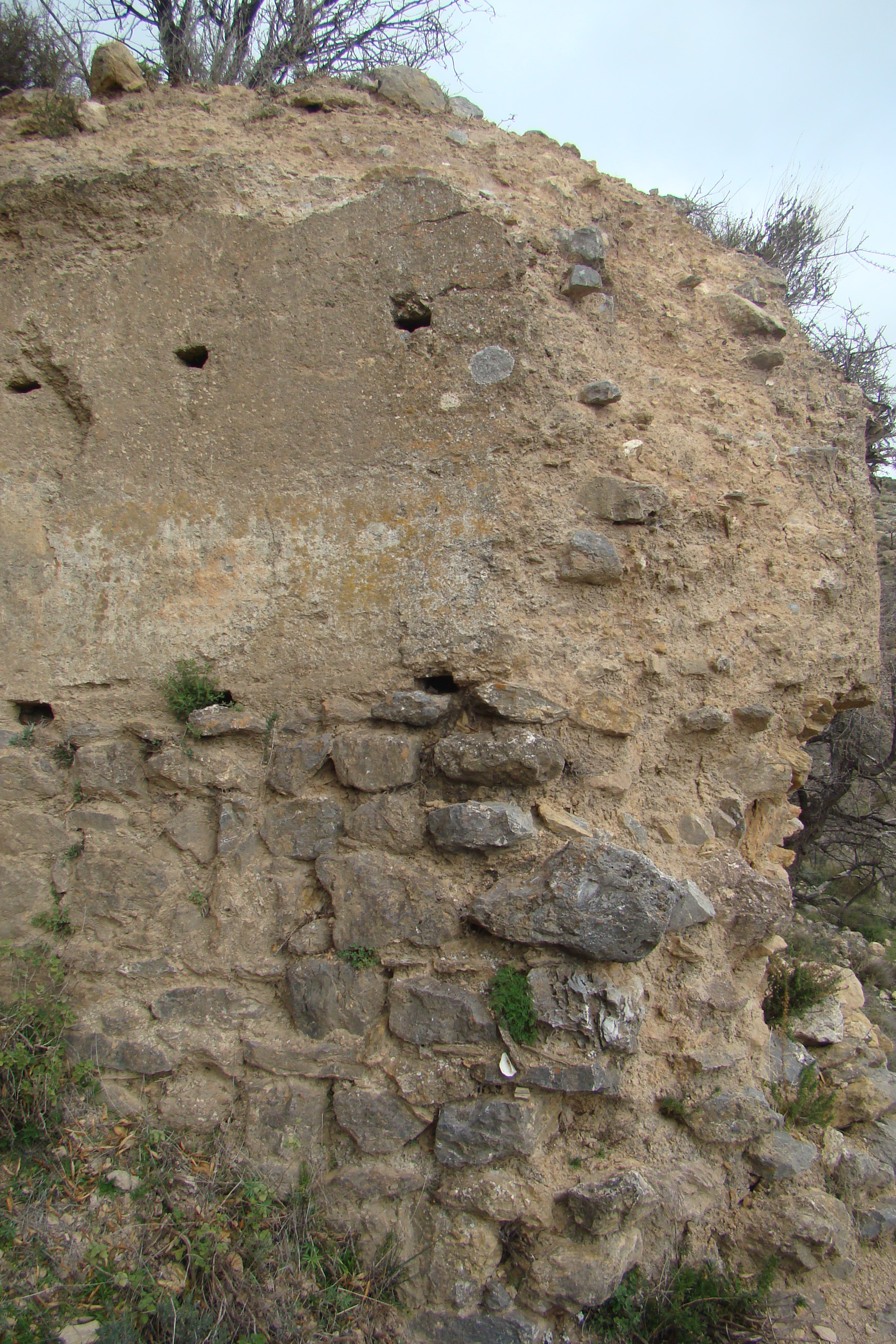 Restos de un torreón de la muralla sur del Fuerte de Juviles (Granada, España)